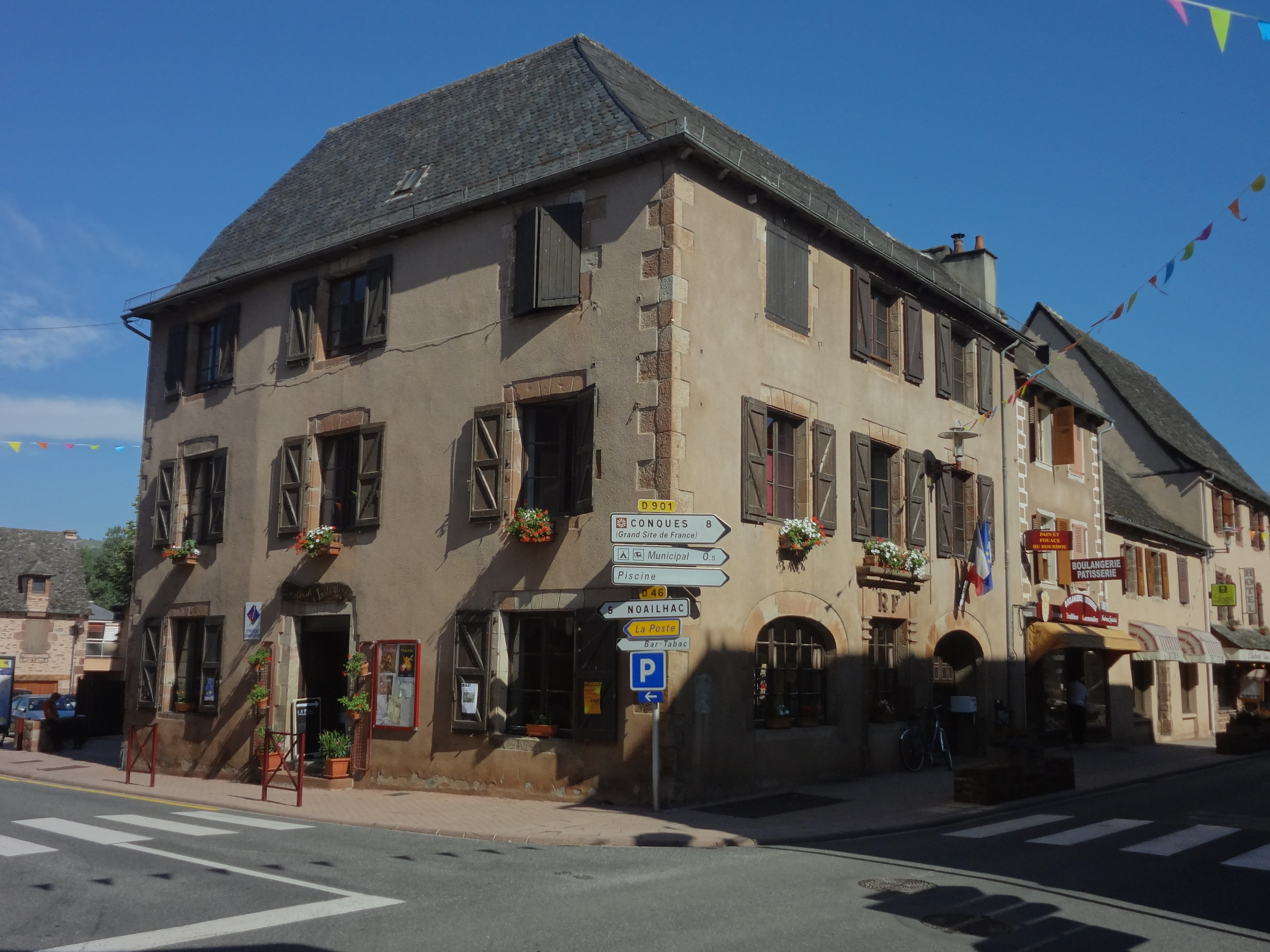 Mairie et office de tourisme